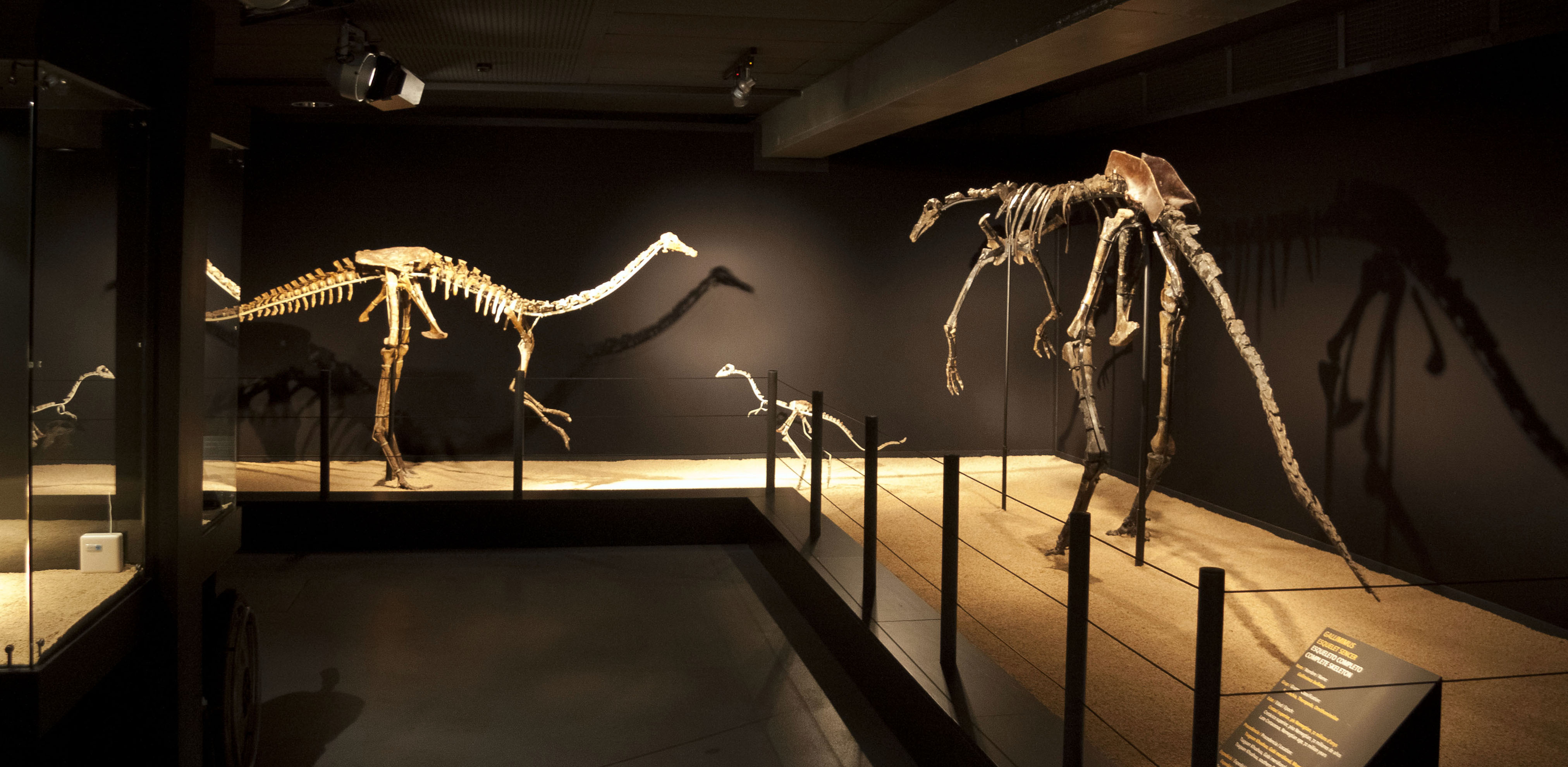 IMG_1224'